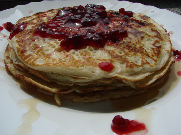 Палачинки с боровиково сладко